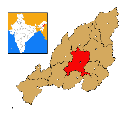 Mapa de localización del distrito